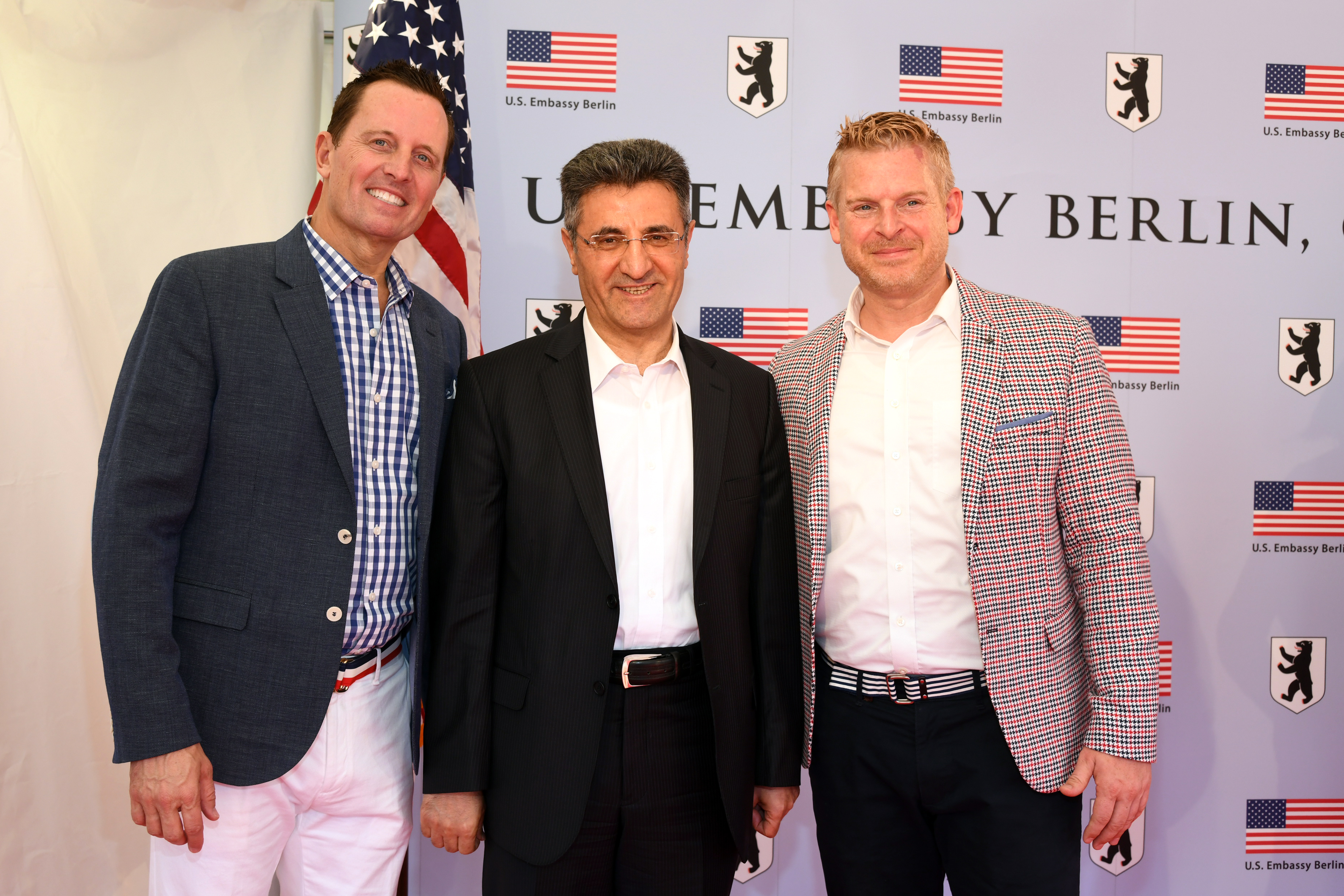 Richard Grenell, Ali Kemal Aydın & Matt Lashey, Sommerfest der US-Botschaft Berlin, 4th of July 2018